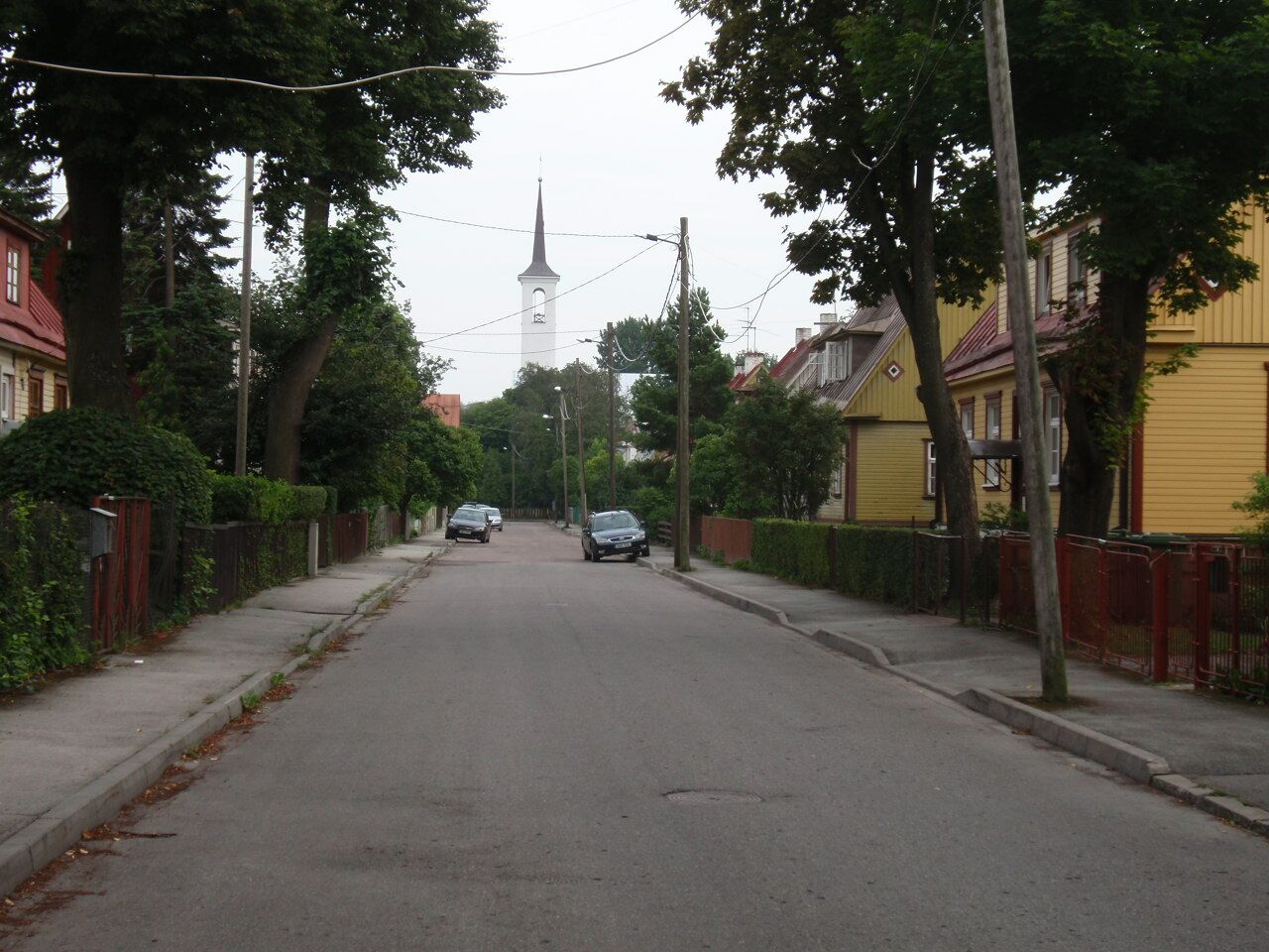 Preesi tänav Tallinnas.